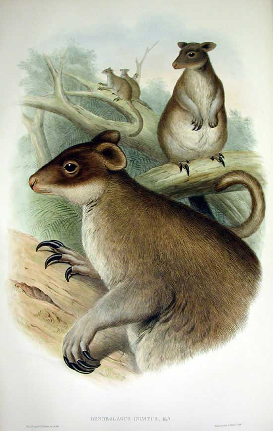 dendrolagus inustus